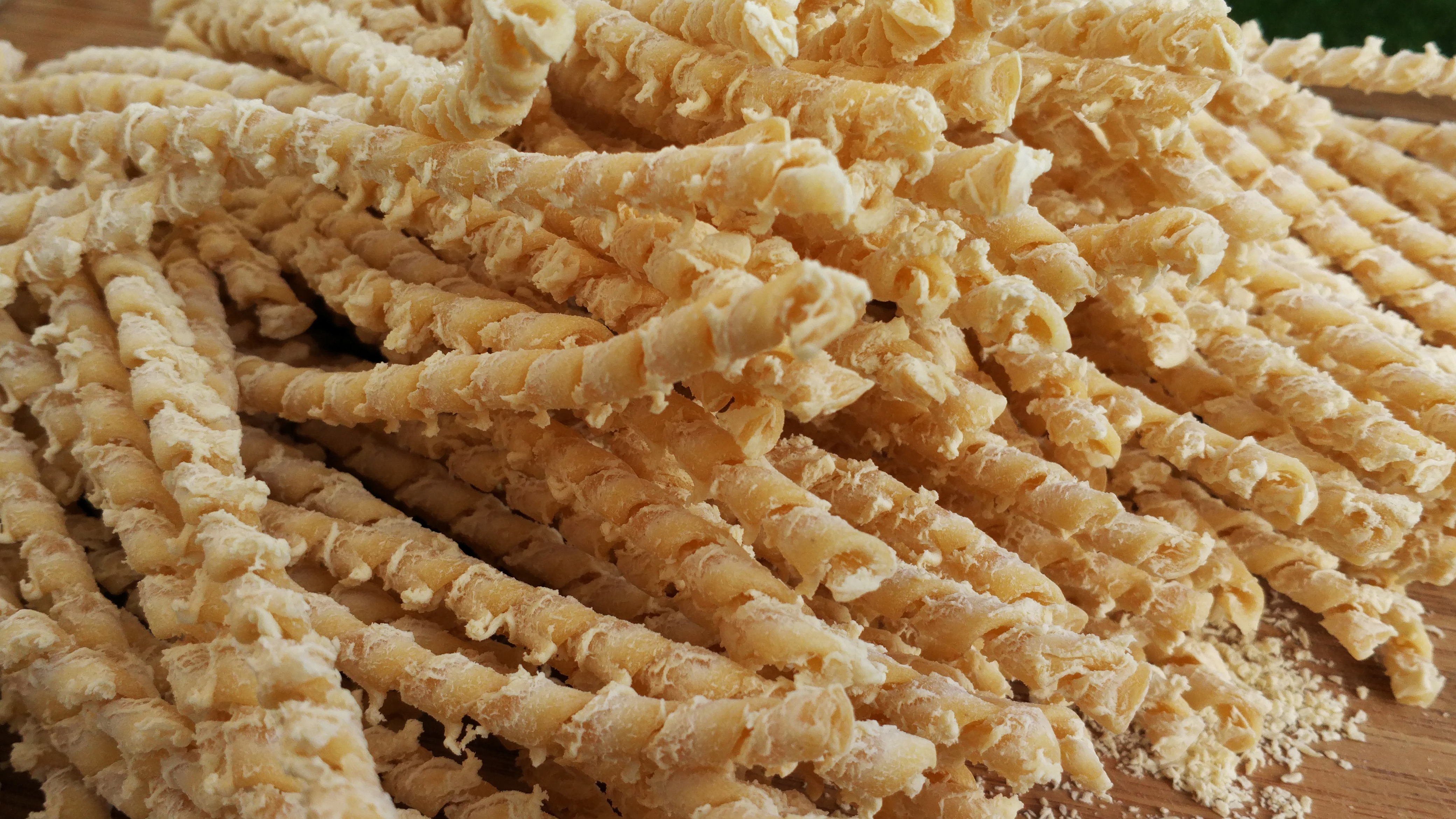 Busiate, a type of italian pasta